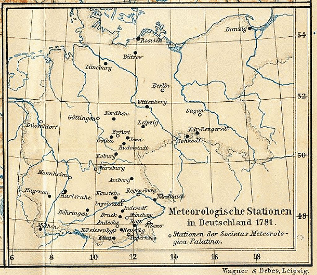 Meterologische Meßstationen im Heiligen Römischen Reich 1781